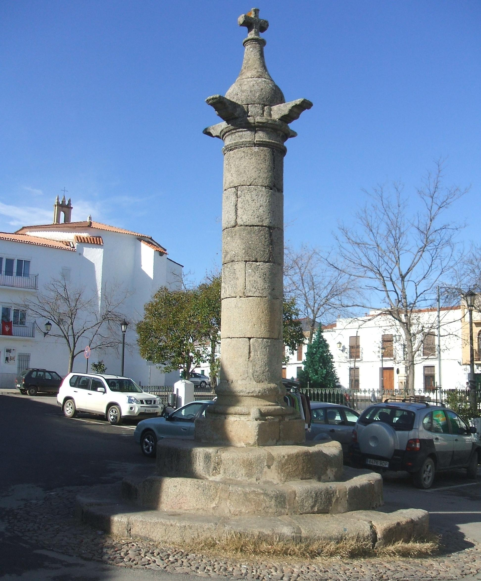 Rollo jurisdiccional de Cabeza la Vaca